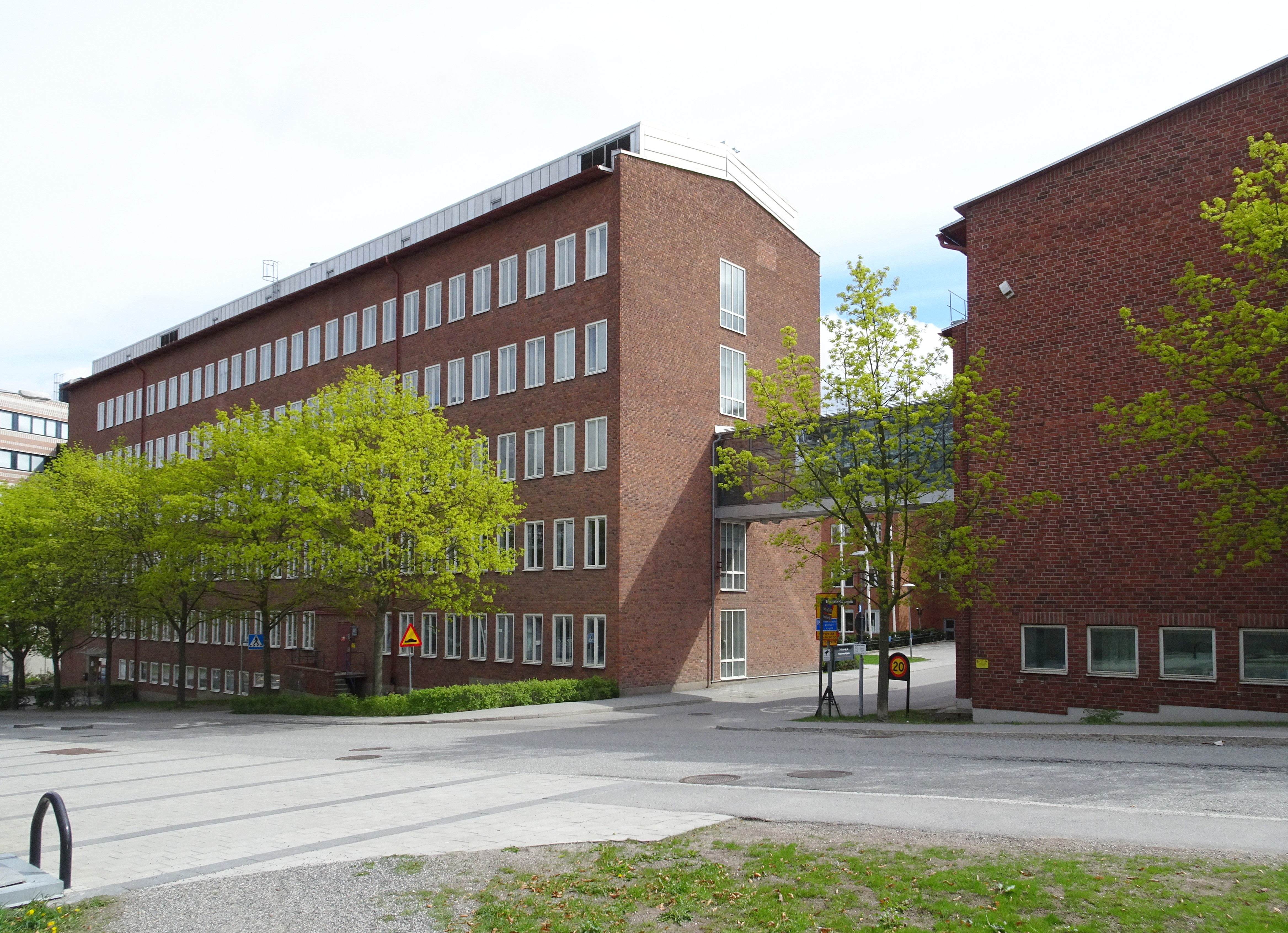 Folkhälsomyndigheten, fasad mot Tomtebodavägen, arkitekt Ture Ryberg